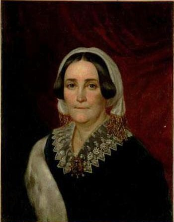 Княгиня Софья Алексеевна Шаховская, ур. Мусина-Пушкина (1790—1878)